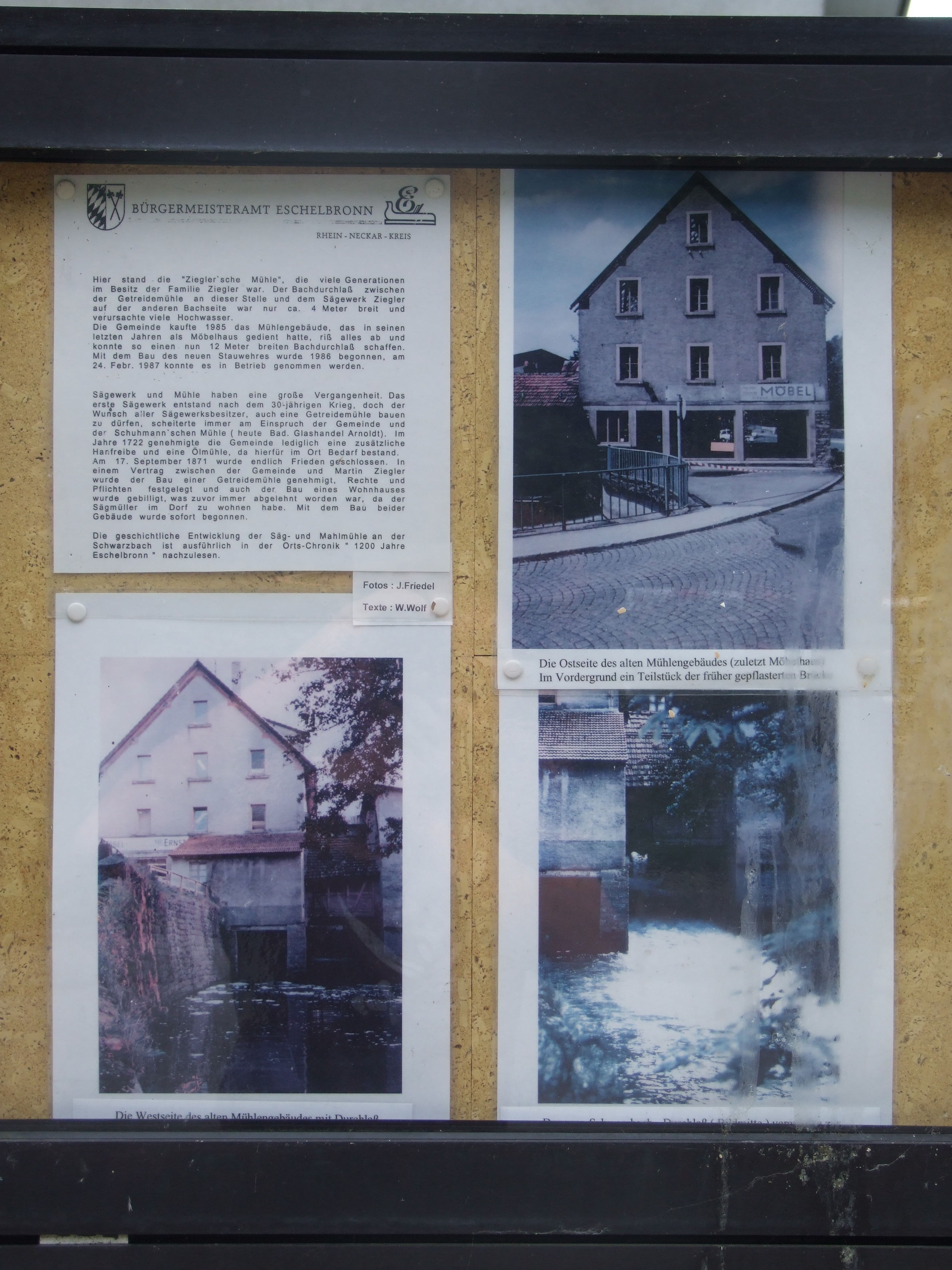 Infotafel am Standort der ehemaligen Ziegler'schen Mühle in Eschelbronn